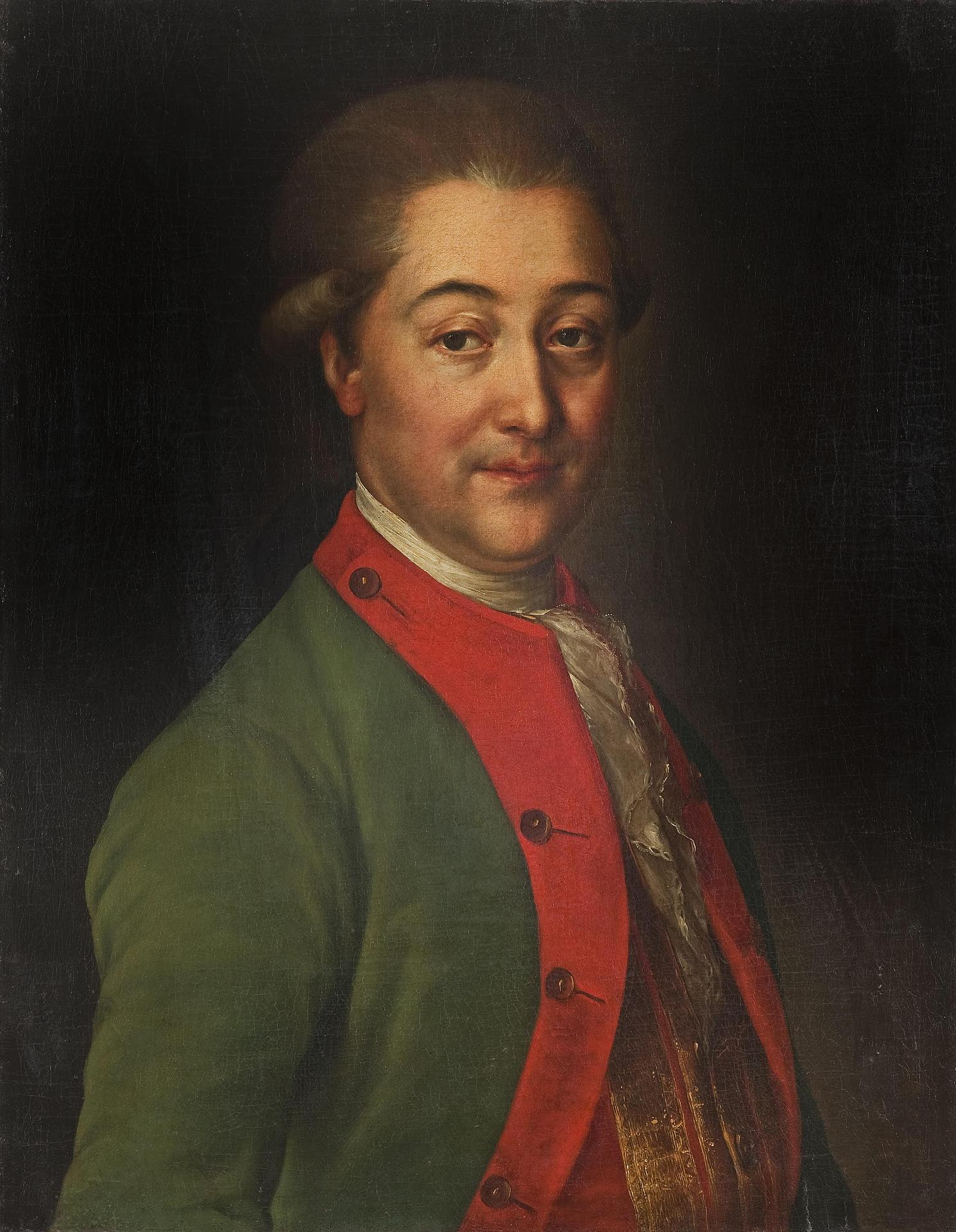 Портрет бригадира Александра Васильевича Храповицкого